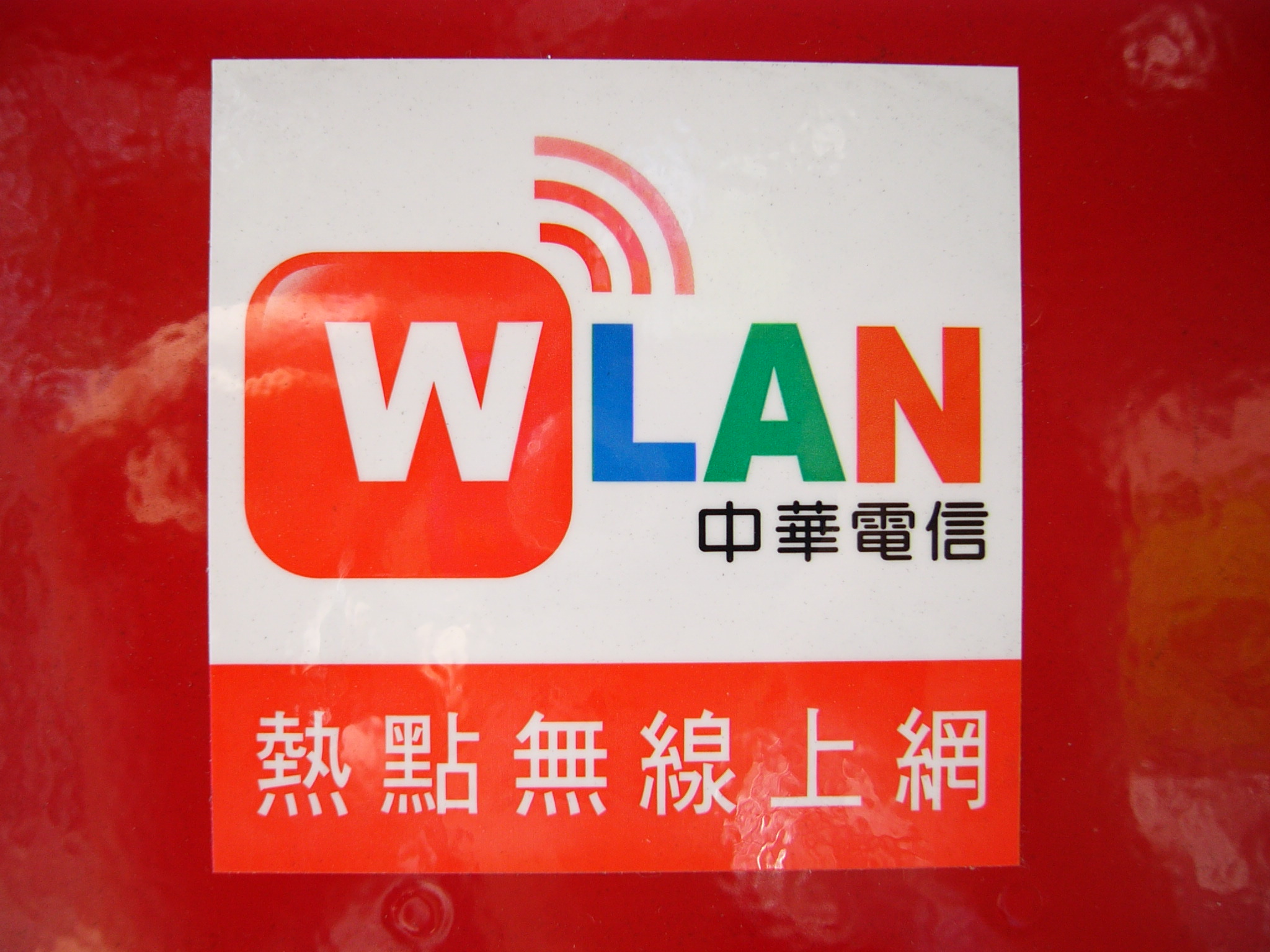 中華電信公用電話亭內的無線上網標籤第2版